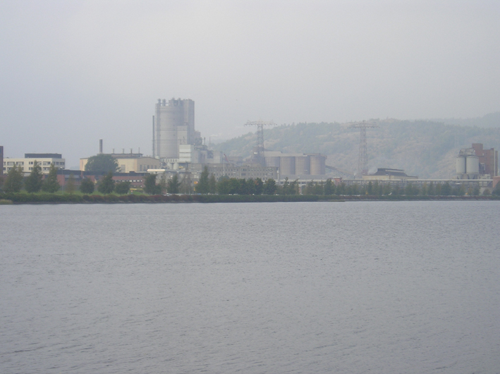 Hydro Porsgrunn plant at Herøya